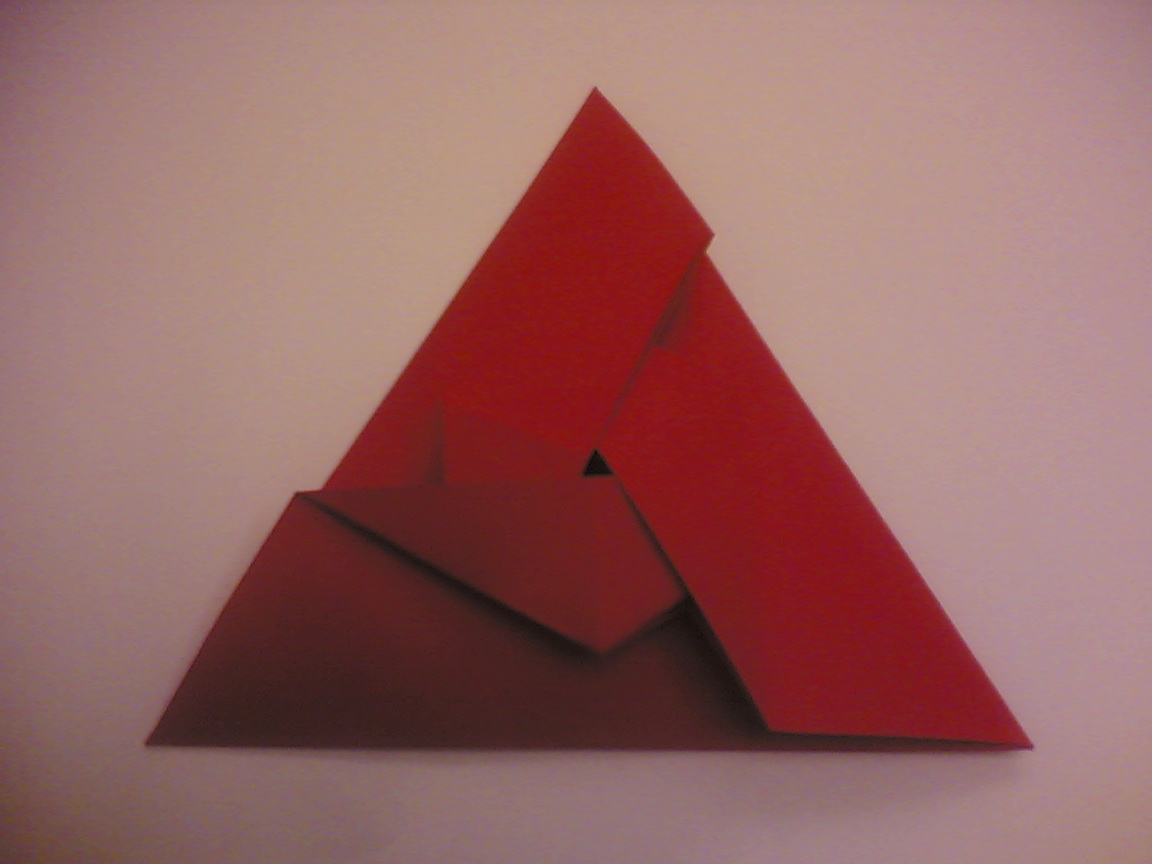 Zamknięta płytka wannolotowa XX 1/2